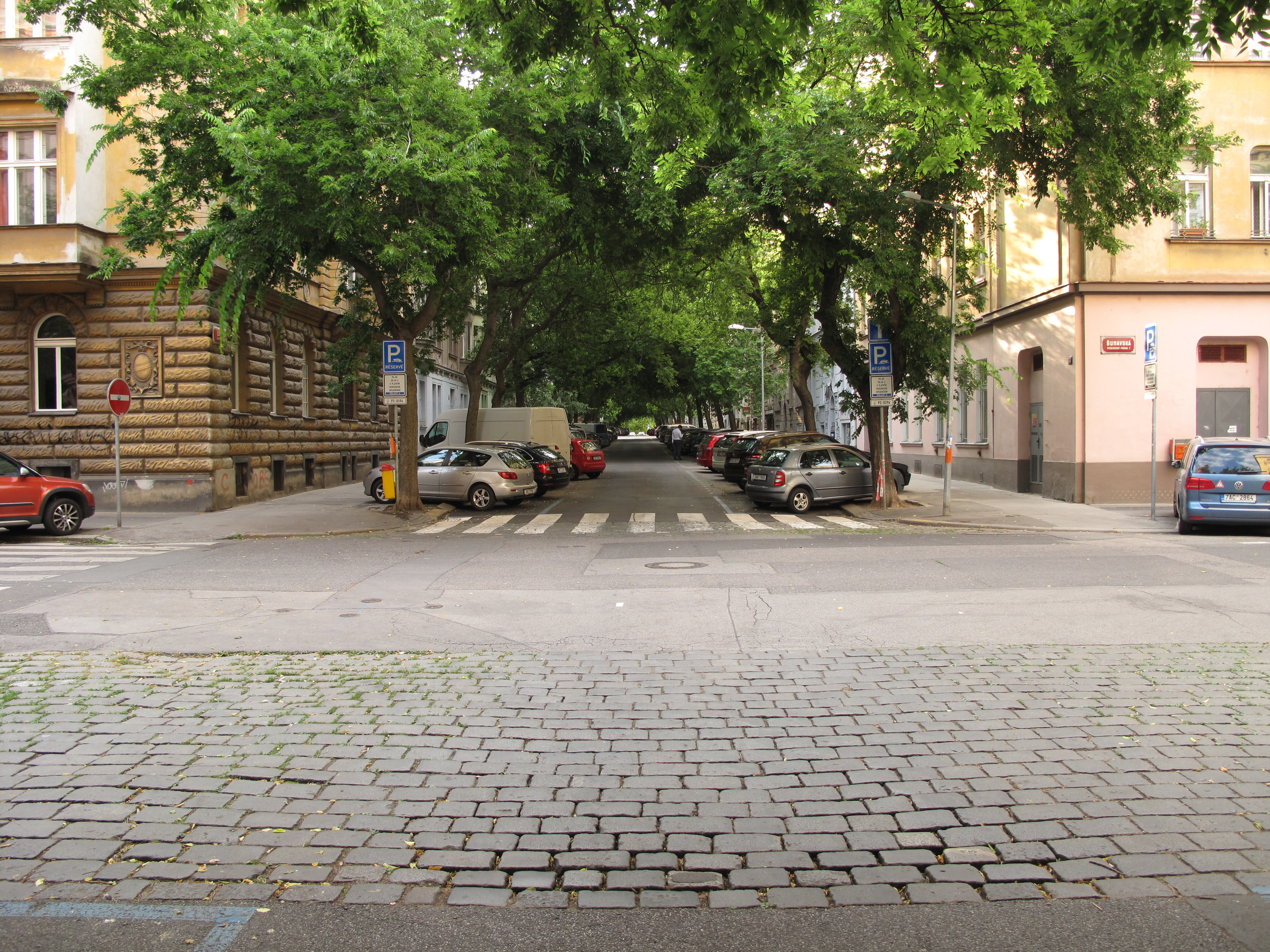 Lužická ulice v Praze. Česká republika.